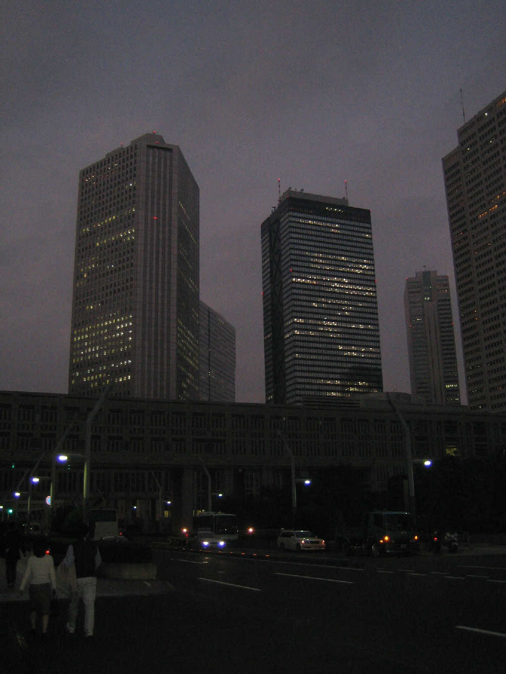 Nishi Shinjuku Japan at night.